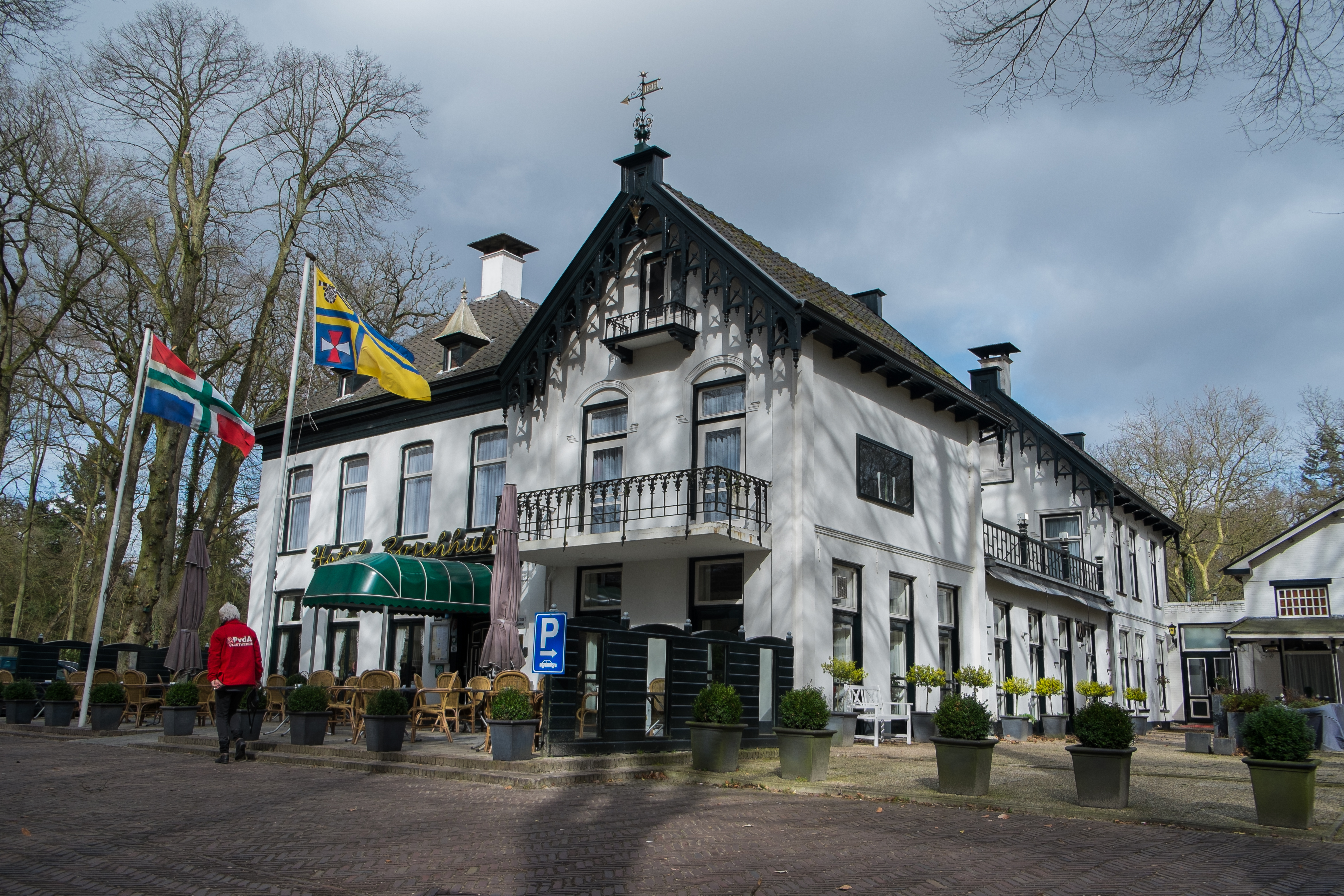 Hotel Boschhuis